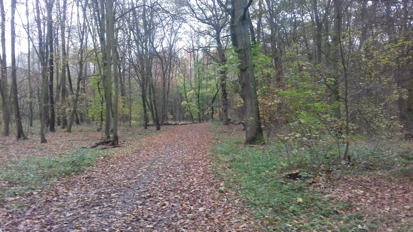 Cesta lesem, která vede ke zřícenině Mydlovar